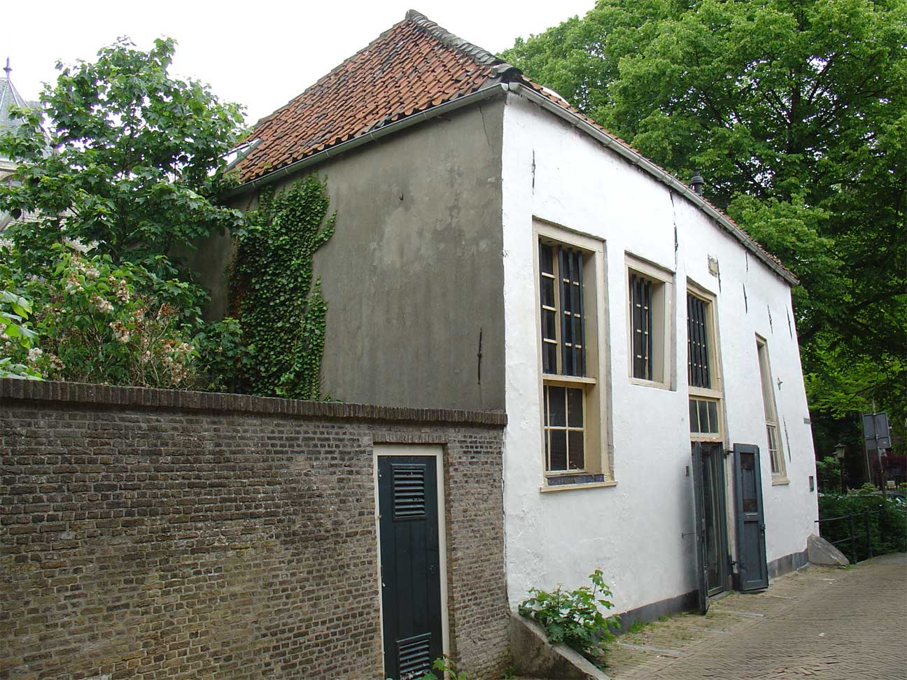 Het Tapijthuis op de hoek van de Molenwerf en Achter de Kerk te Gouda